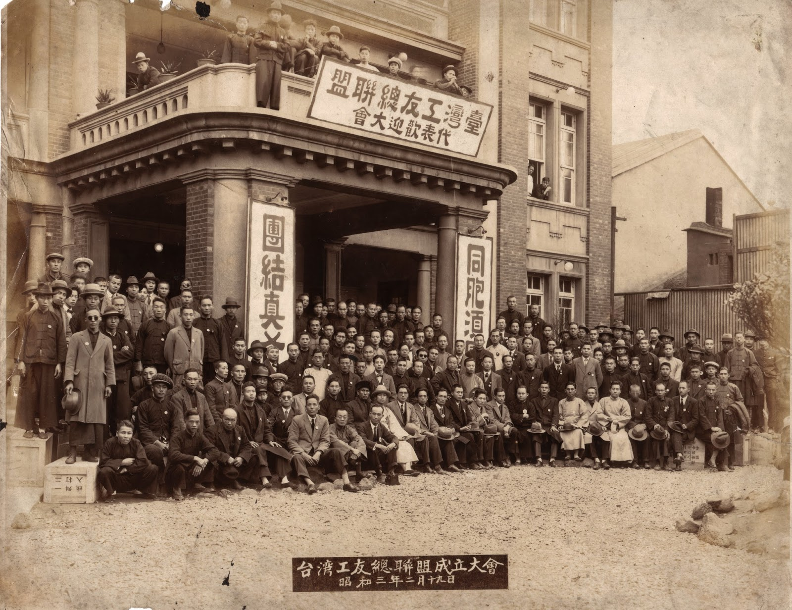 中文（台灣）: 1928年2月19日，台 灣29個工會組織於台北市蓬萊閣舉行「台灣工友總聯盟」成立大會，成為台灣第一個全島性的工會組織。 在蔣渭水指導下，至1928年底，全島工友會已擴展至69個團體，曾發動十餘次罷工， 勞工運動繼農民運動之後，亦開始蓬勃發展。